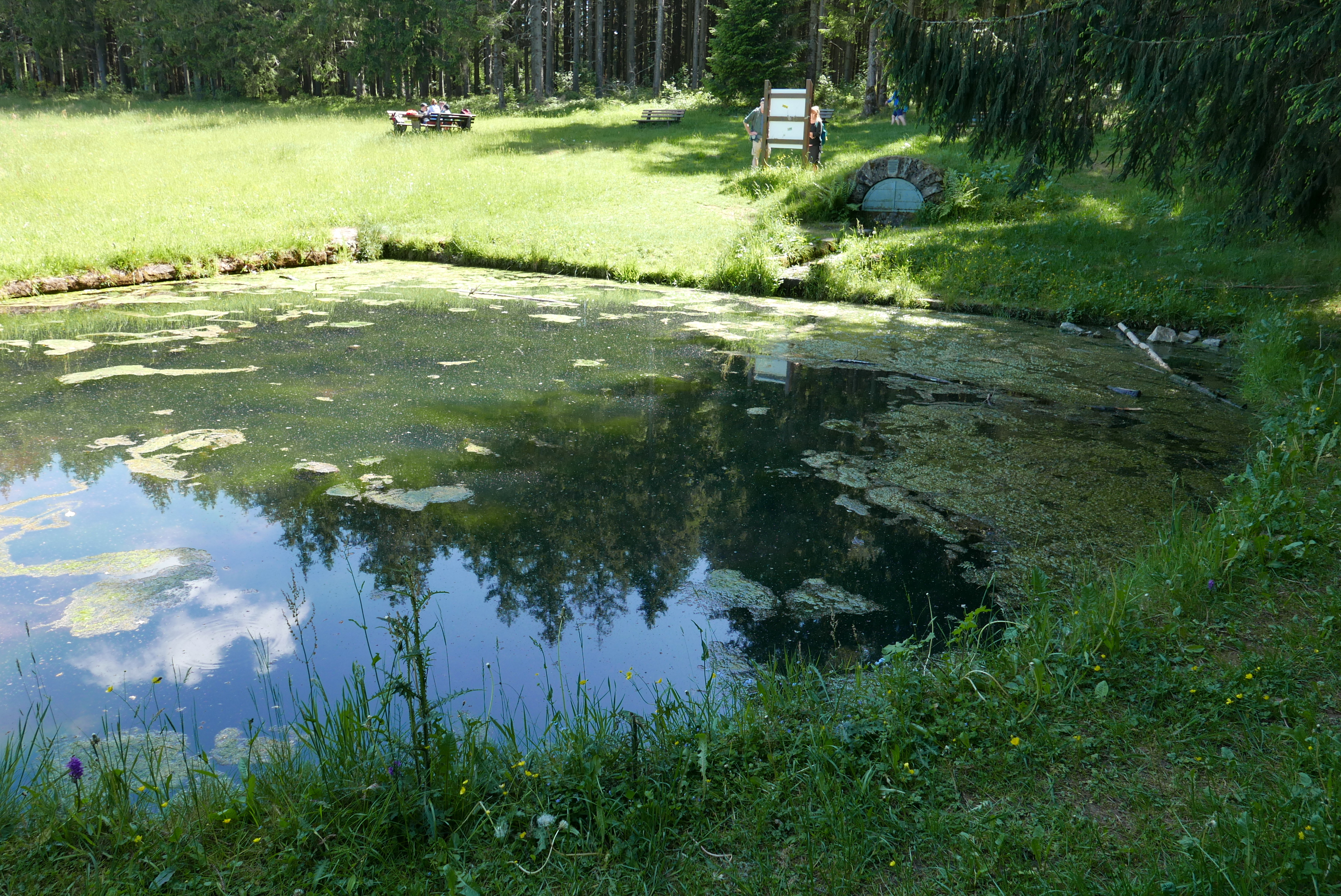 Quellteich an der Schutterquelle beim Hünersedel, Gemarkung Schweighausen